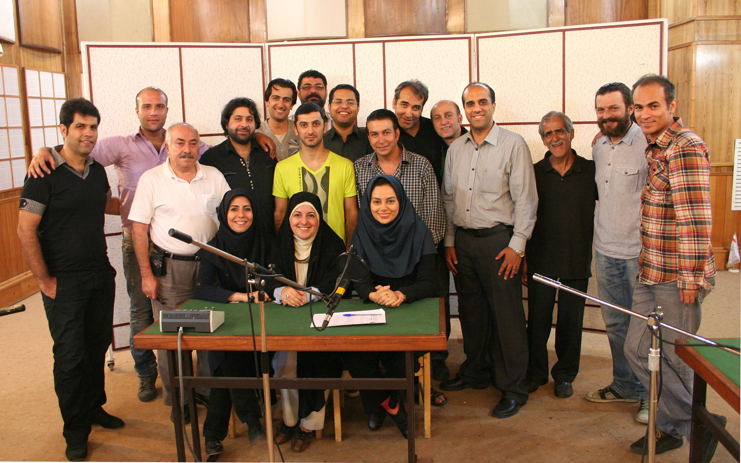 "فرهاد ظريف" ميهمان عيد فطر "كوي نشاط" راديو ايران